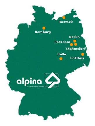 Standorte der alpina ag 2020